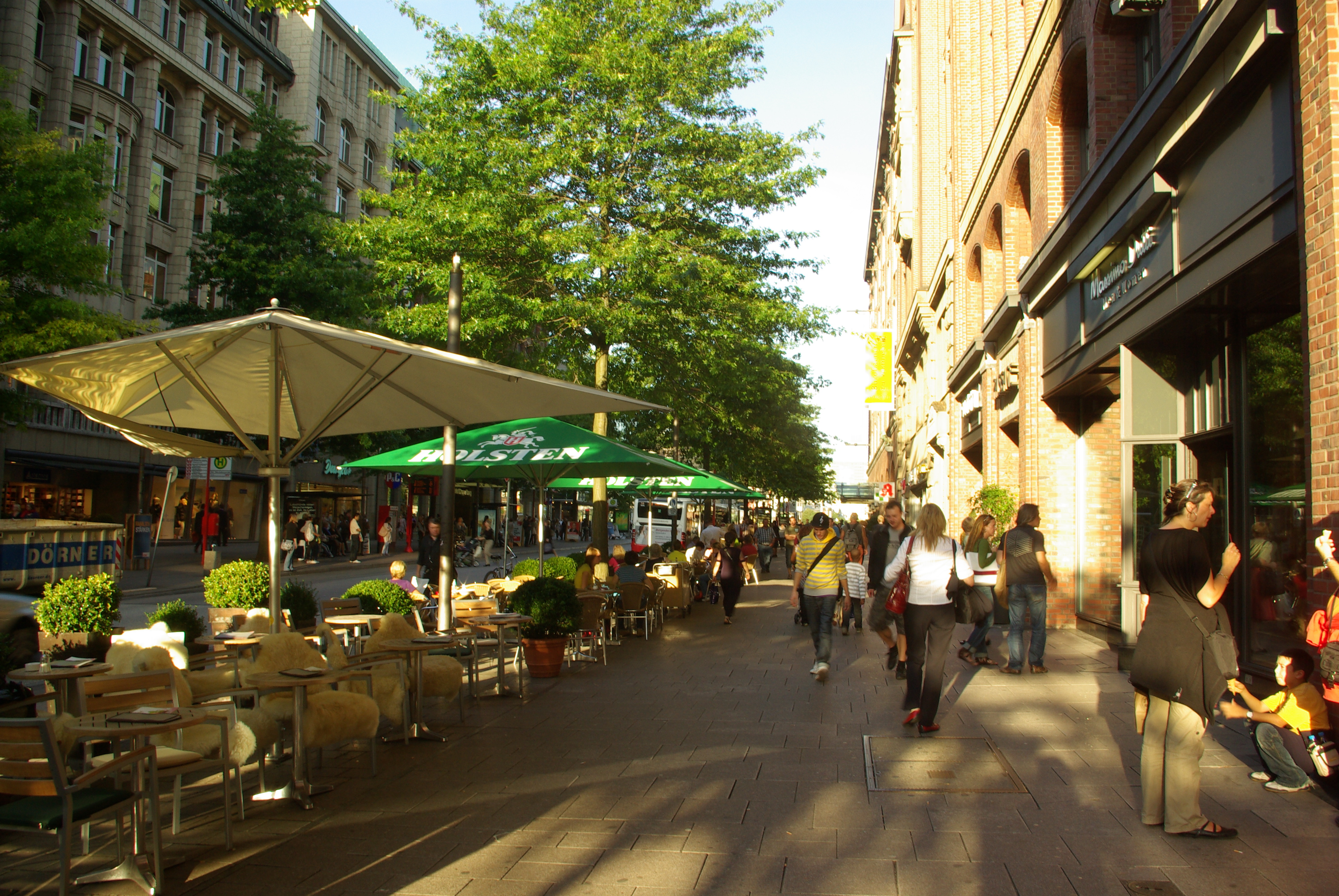 Mönckebergstraße, Hamburg, 31.08.2009 18-42-51.2009 18-42-51